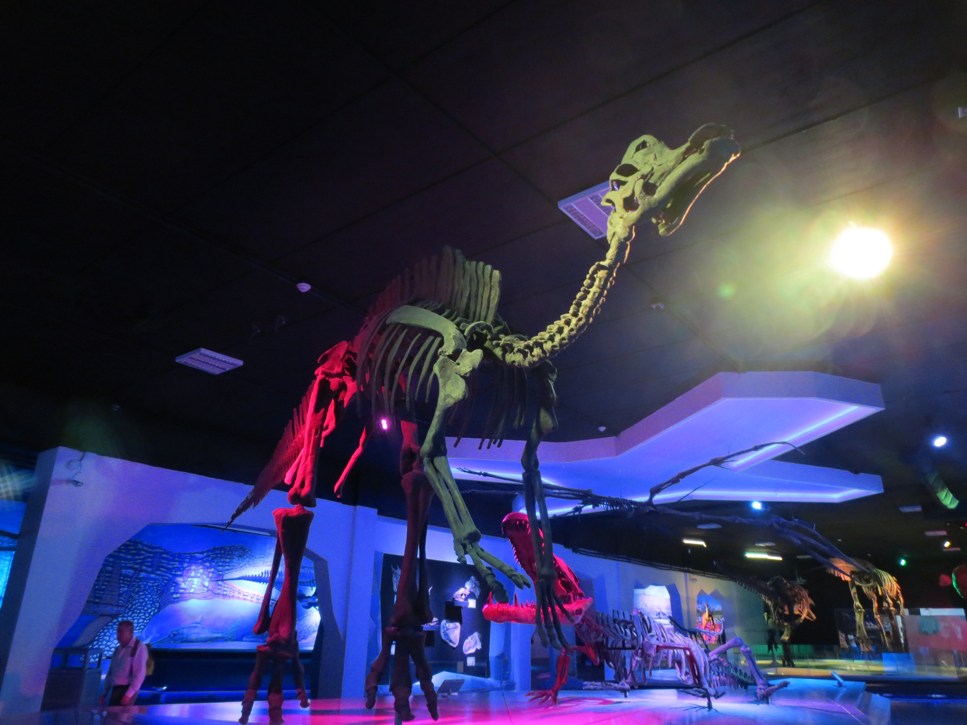 Esqueleto de Velafron Coahuilensis en el Museo de la Evolución de Puebla